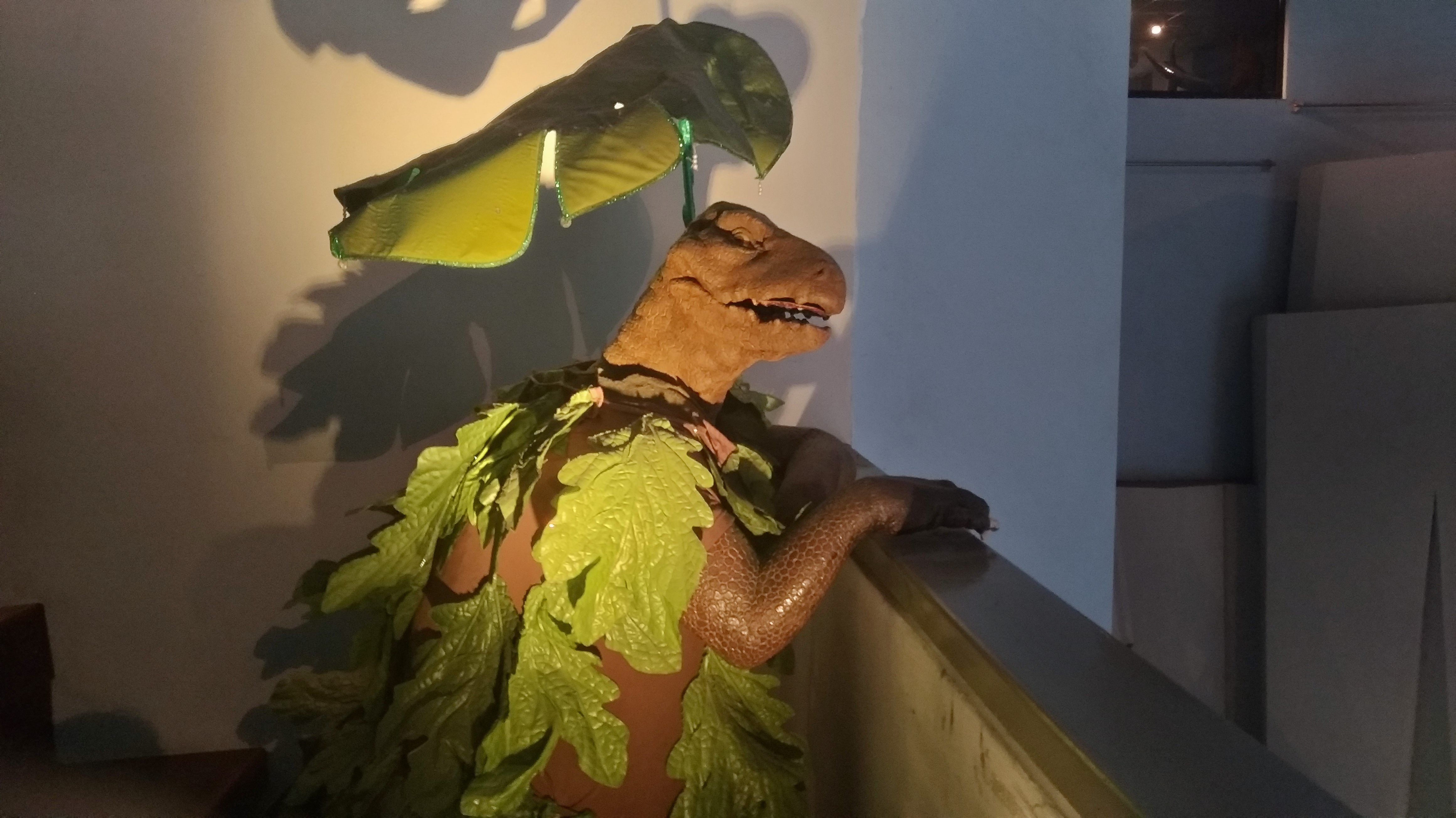 中文（台灣）: 藏於國立自然科學博物館的機械恐龍，會發出警訊告誡遊客